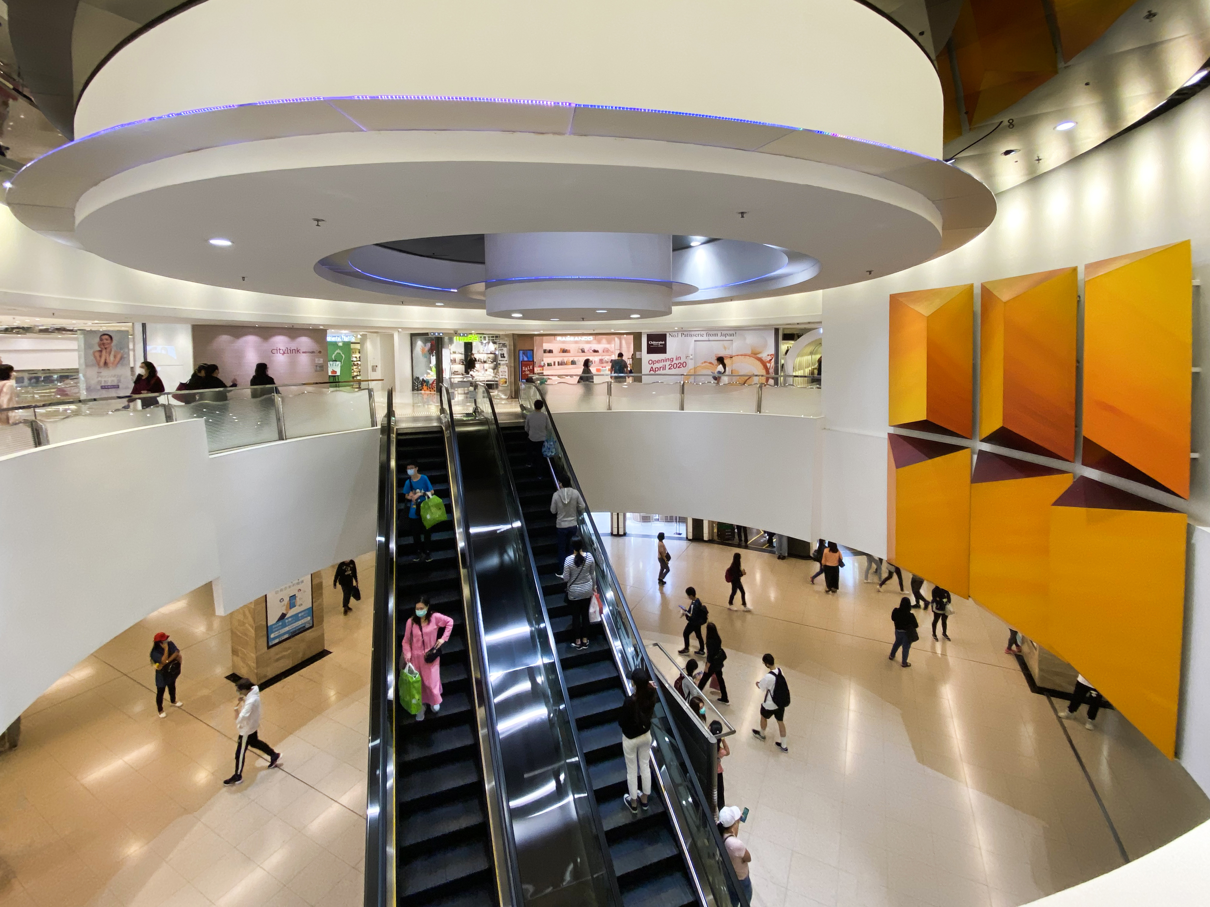 Citylink Void